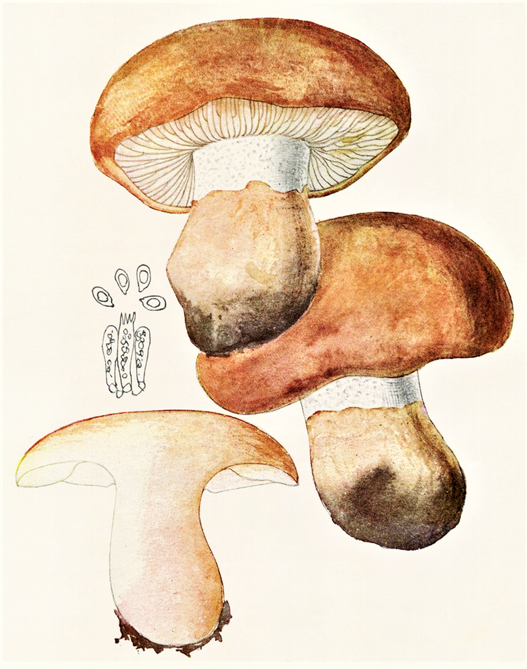 Giacomo Bresadola: Tricholoma colossus (Fr., 1836) Quél. (1872)